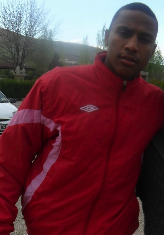 Marvin Zeegelaar